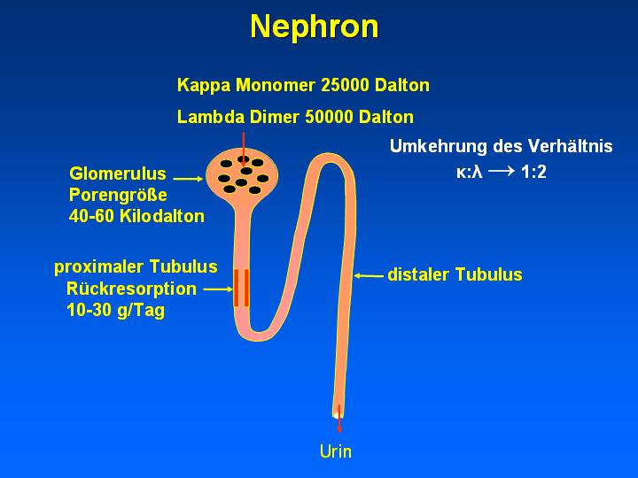 Nephron, Filtration der Freien Leichten Immunglobulinketten.